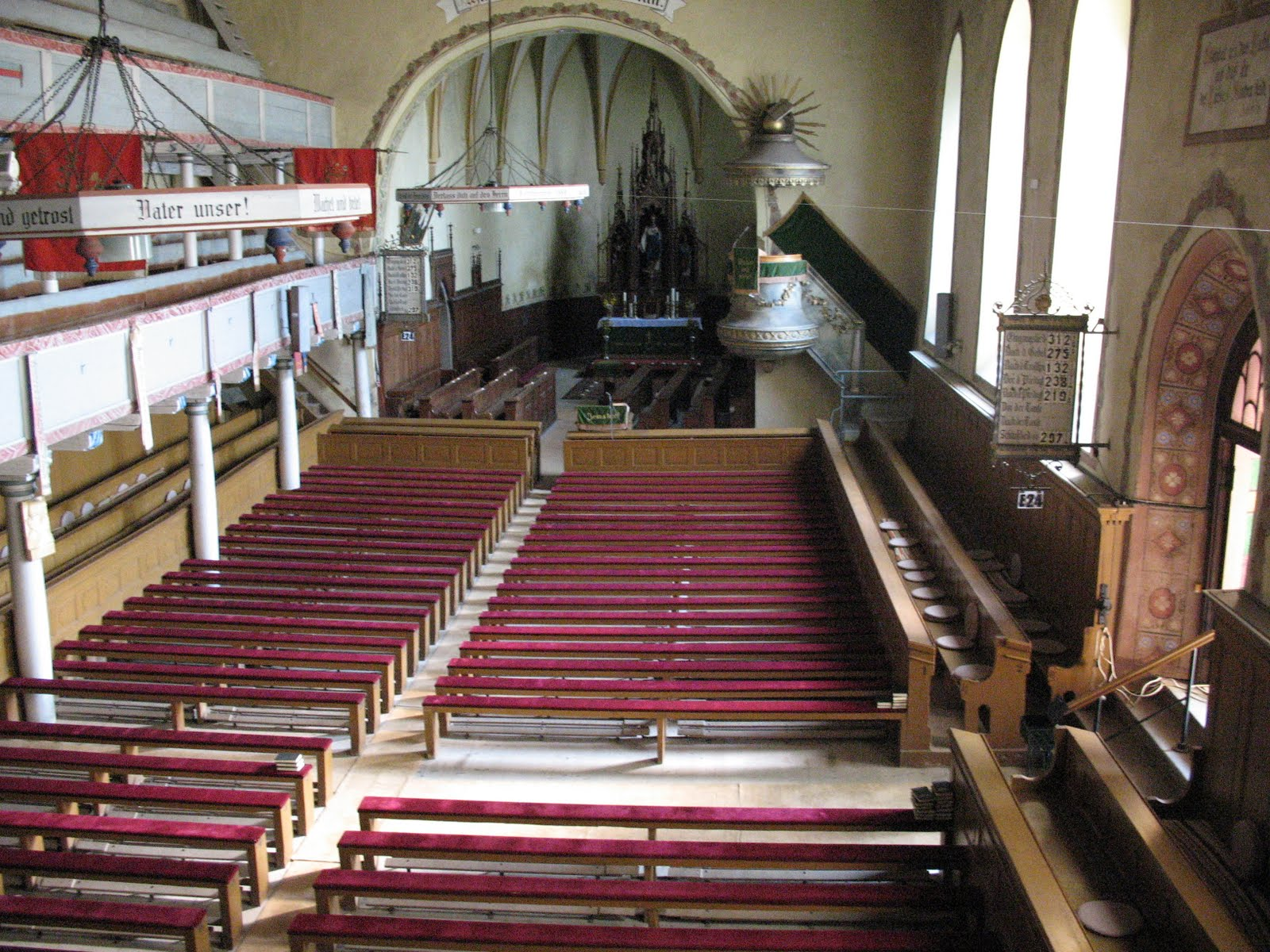 Sicht in Richtung Altar der Evangelischen Kirche in Codlea / Zeiden, Rumänien